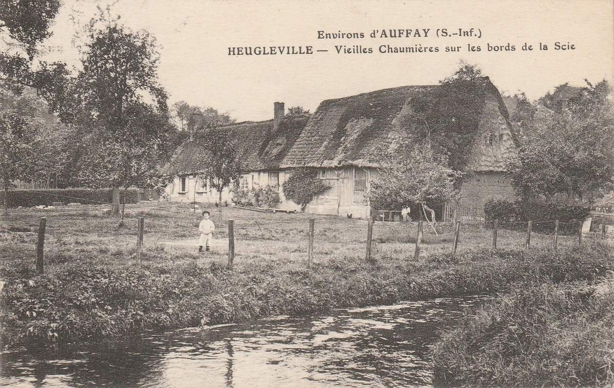 Carte postale des bords de la Scie